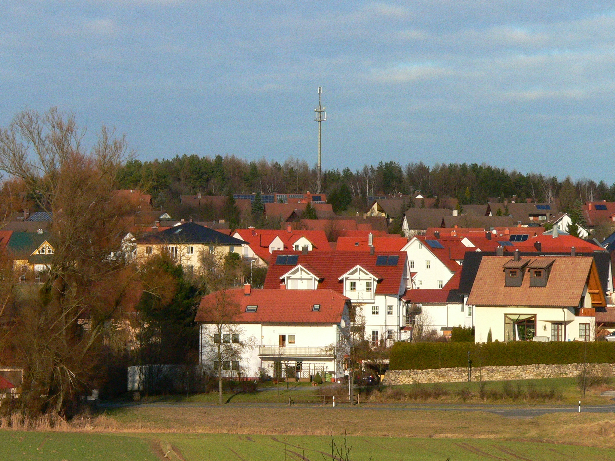 Coburg Stadtteil Scheuerfeld, Neubaugebiet